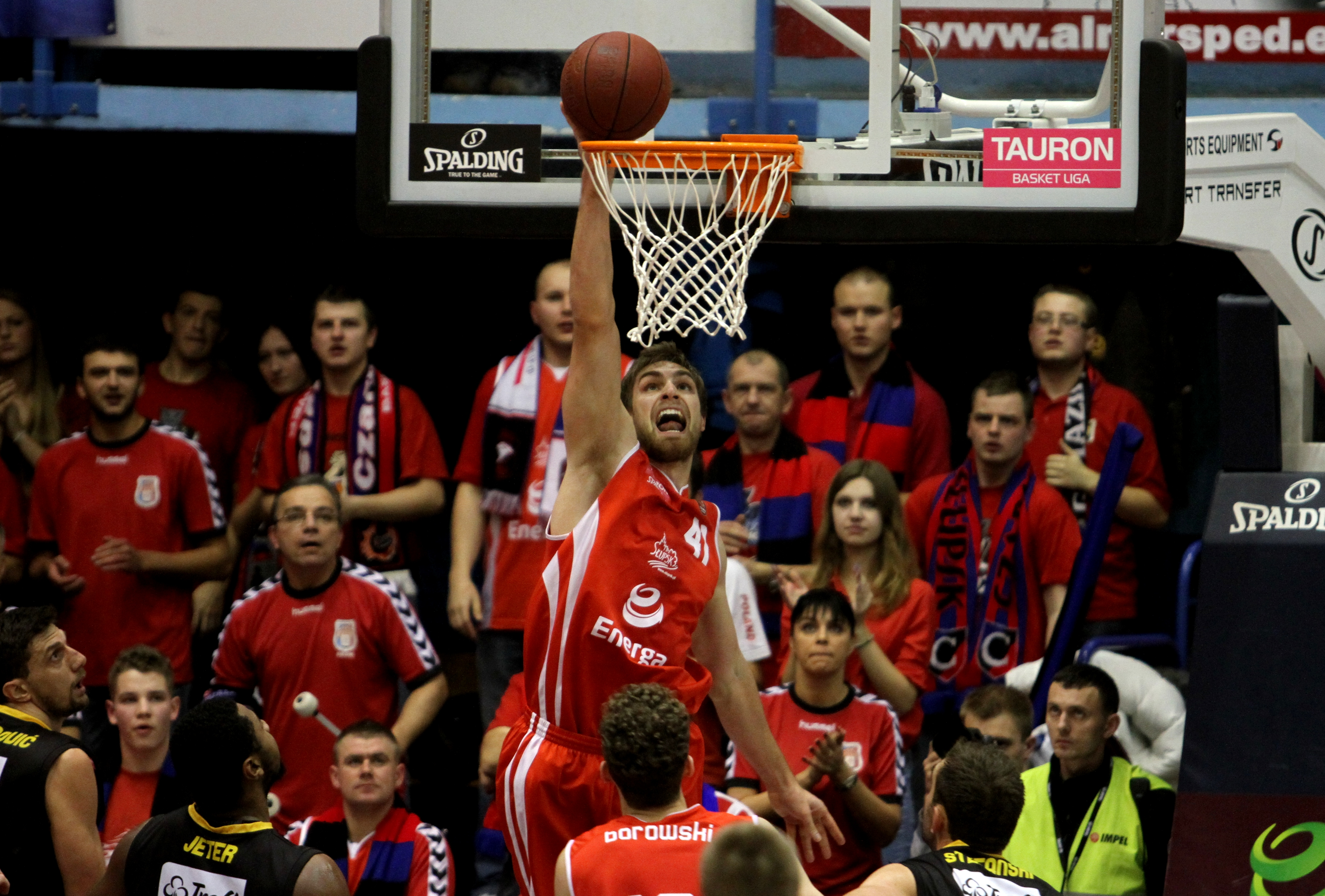 Garrett Stutz, Energa Czarni Słupsk